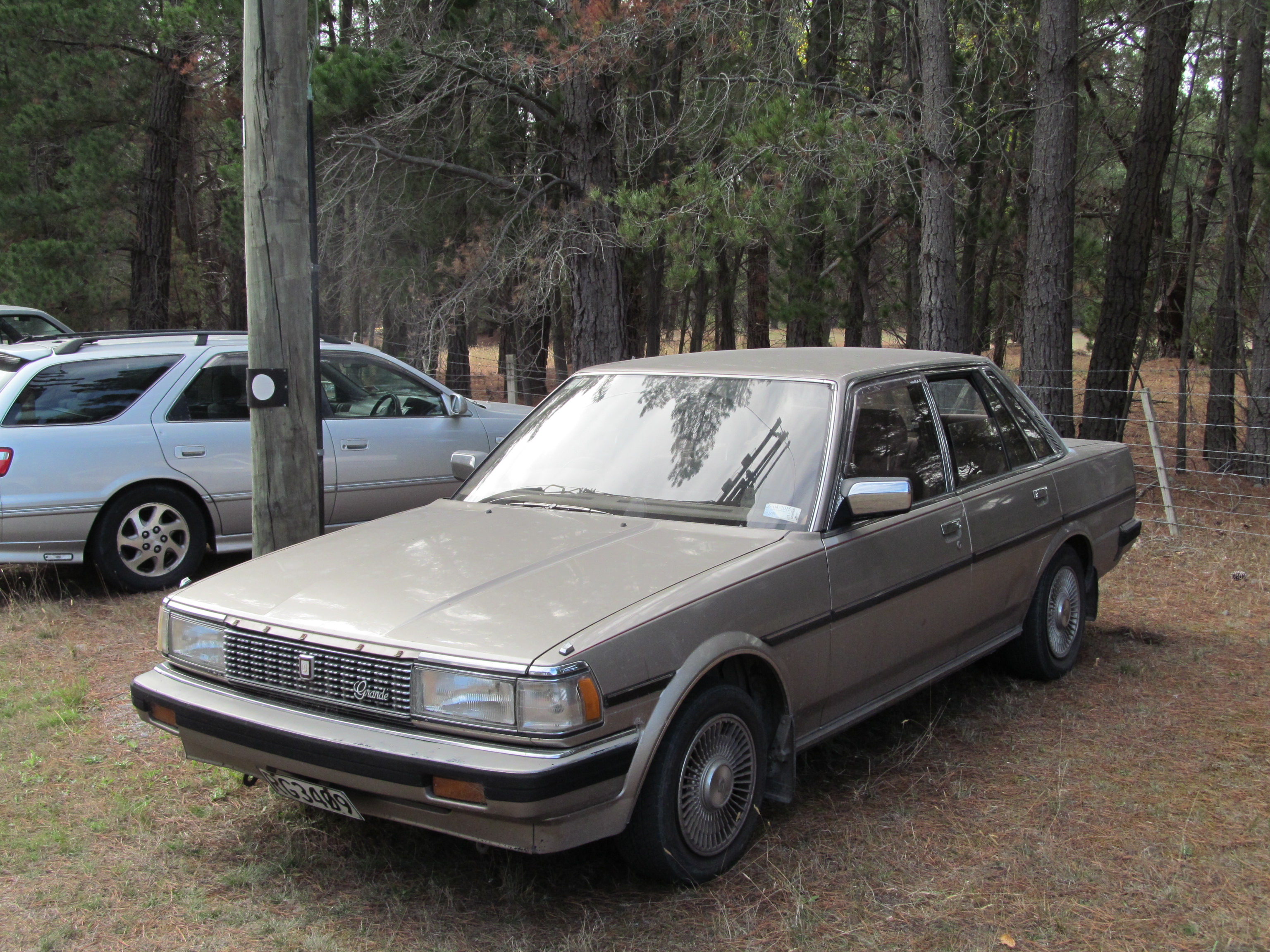 1984 Toyota Mark II Grande